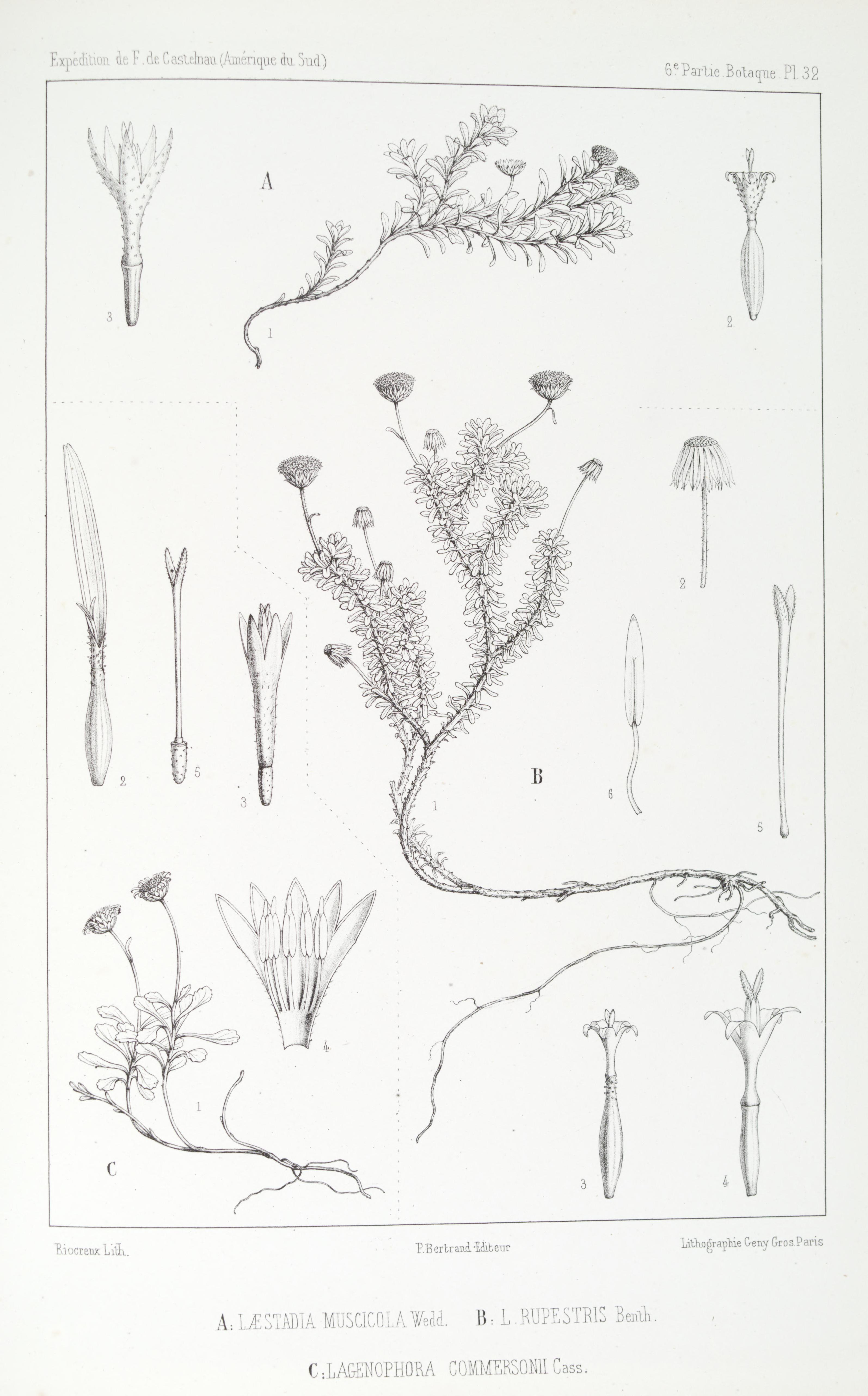 Chloris andina :essai d'une flore de la région alpine des Cordillères de l'Amérique du Sud /par H.A. Weddell.